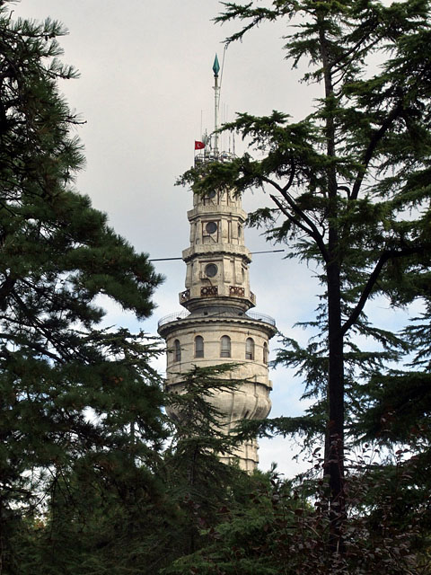 Beyazit Tower, Istanbul